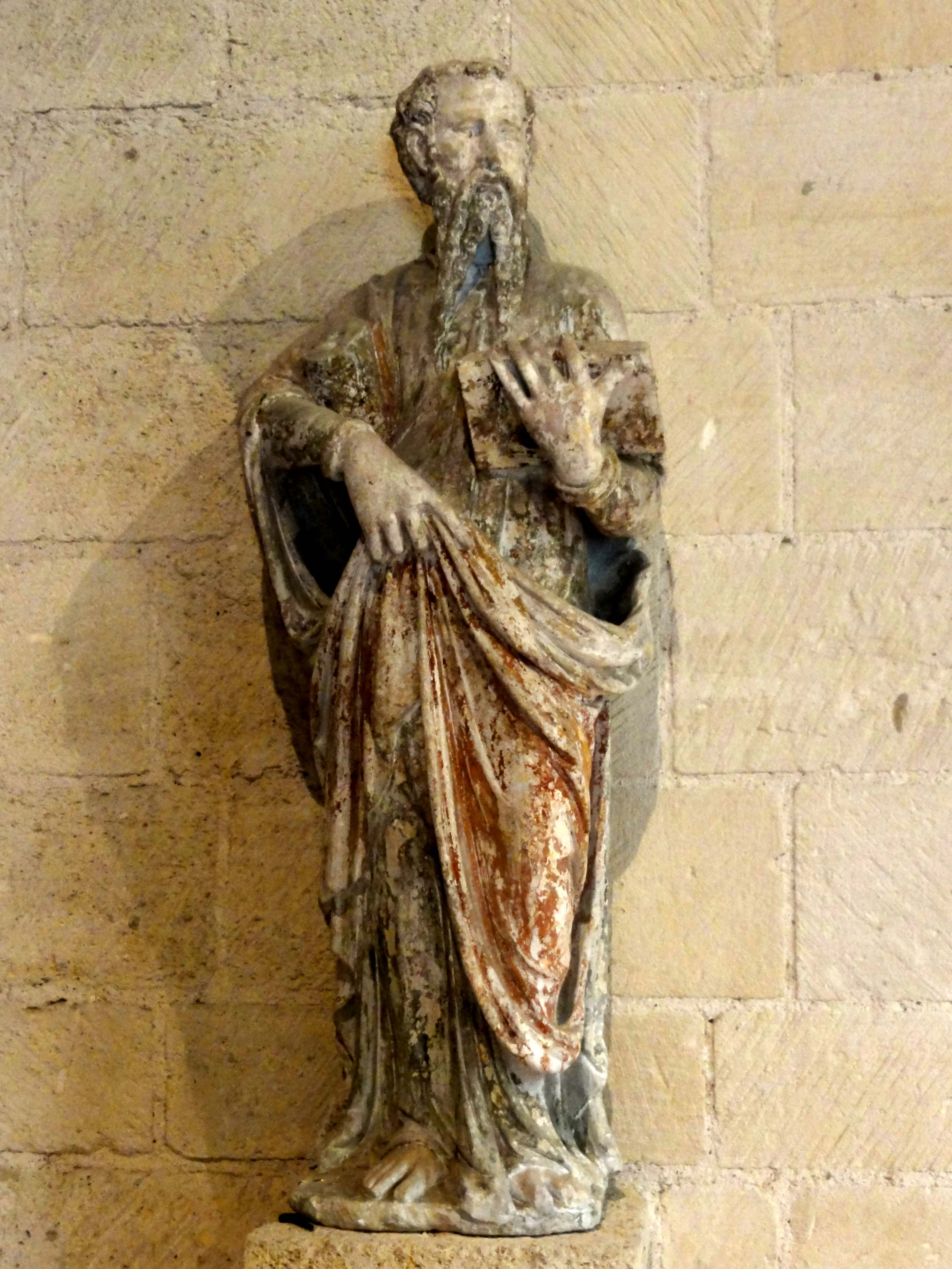 Mobilier de l'église - voir titre.